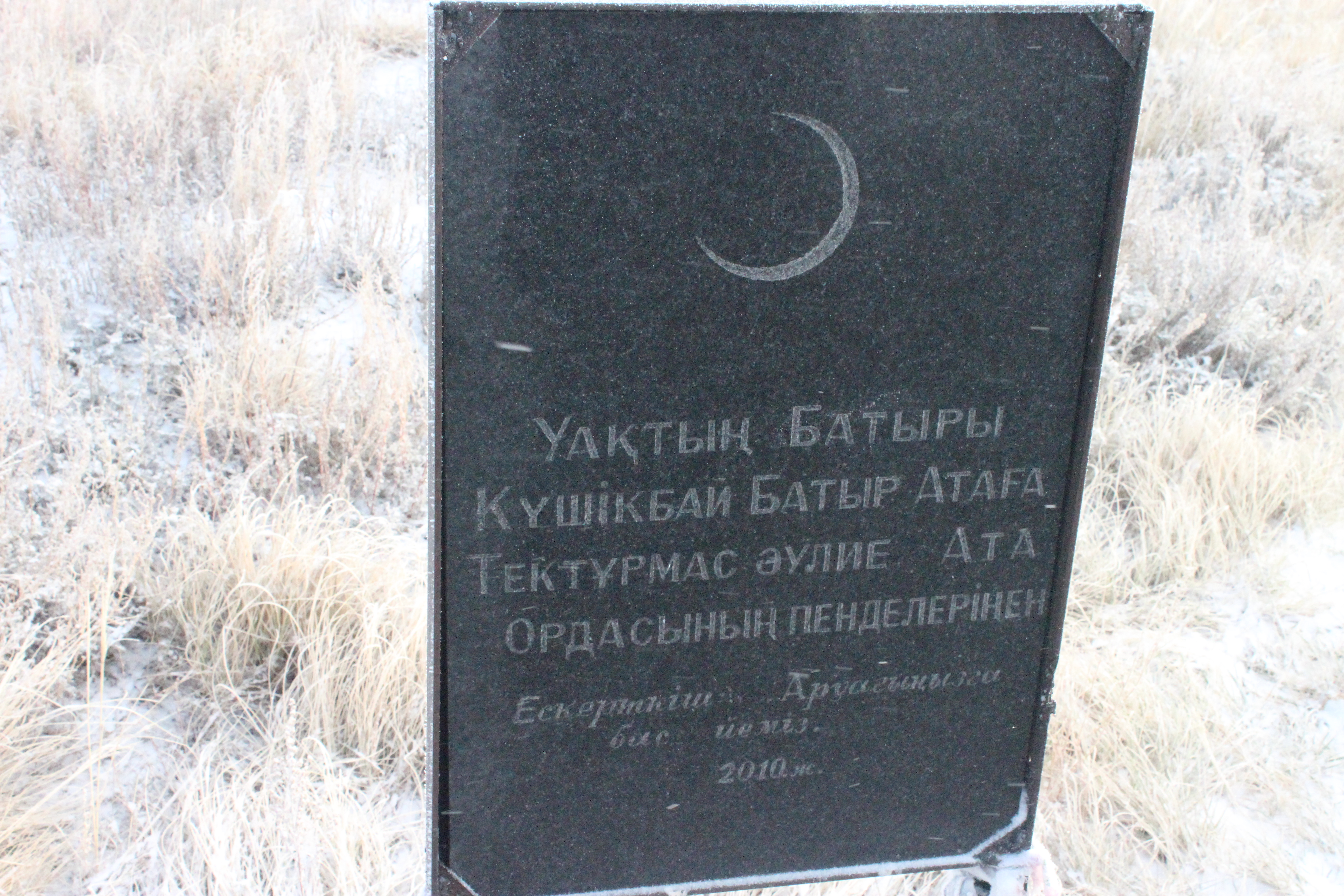 Қазақша (кирил): Шығыс Қазақстан облысындағы Күшікбай батырға арналған ескерткіш